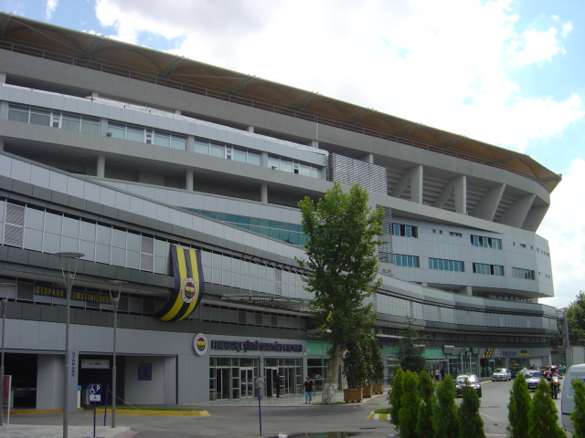 Fenerbahce stadion, Sukru Saracoglu Stadion, Eigen werk, Gemaakt in juli 2006.